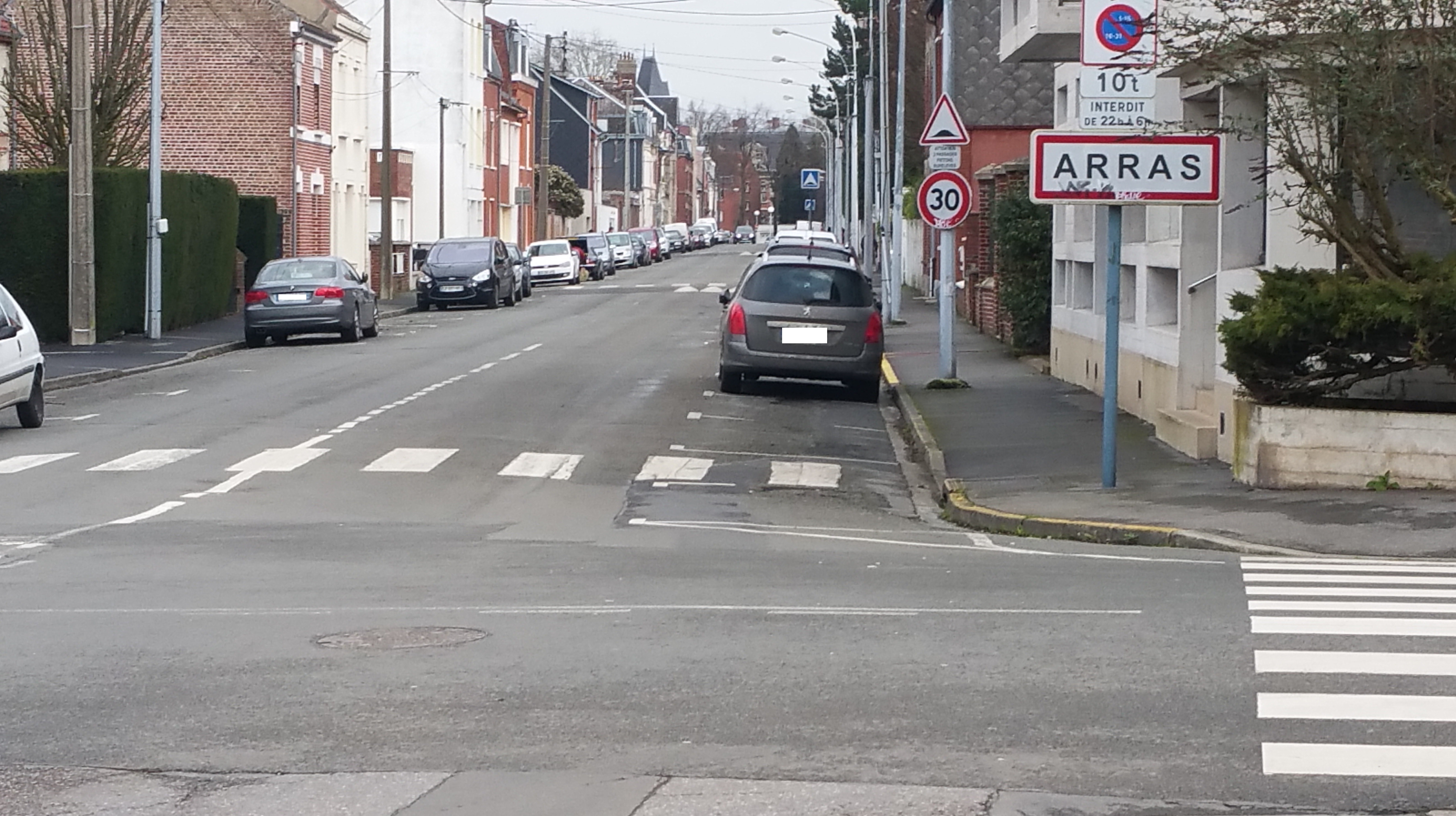 Vue d'une entrée de la commune d'Arras.